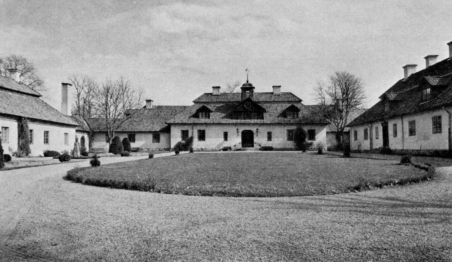 Hanebergs huvudbyggnad